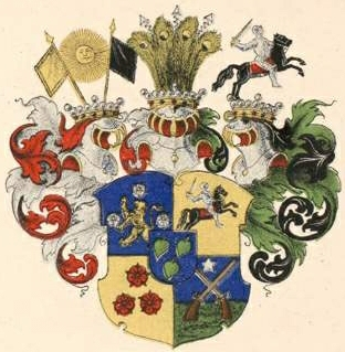 Pahleni suguvõsa vabahärravapp